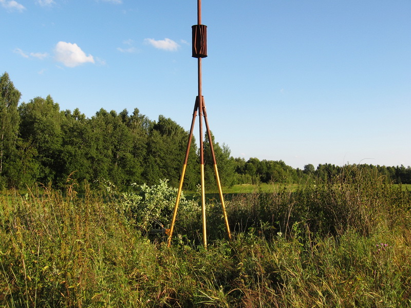 Лойці. Дуга Струвэ. Пункт «Лойцы»